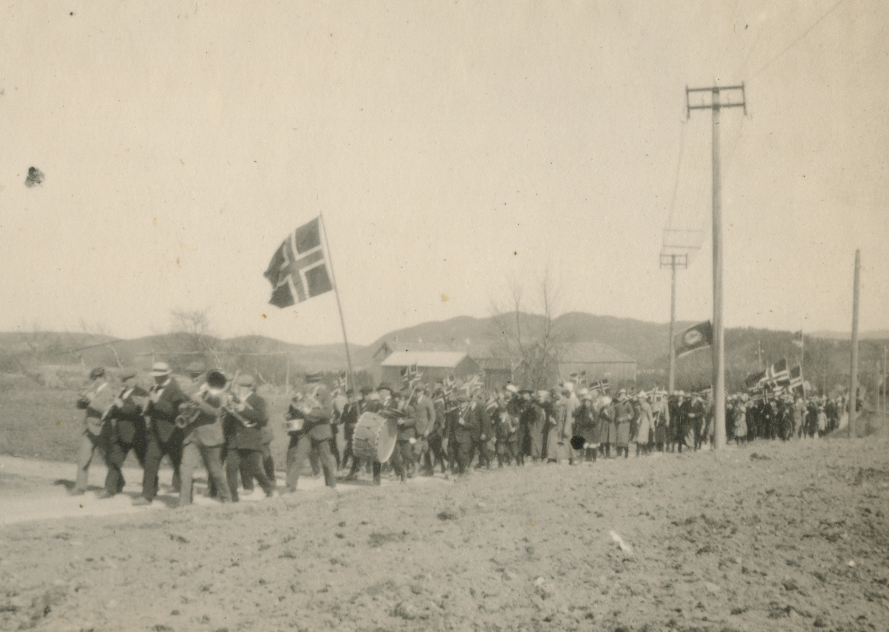 17. mai-tog i Åsen, trolig på 1920-tallet. Fremst går Åsen hornmusikklag. Toget nærmer seg Åsen kirke og Kjerkstuggu. Stabburet til venstre tilhørte Kjerkstuggu. Bildet er tatt før 1930, da det nye Heradshuset ble bygd. Gårdene i bakgrunnen er Vedul vestre (212-1) til venstre og Vedul østre (212-4) til høyre. Fotograf / Photographer: Ukjent År / Year: 1920-1929. Sted / Place: Åsen Fotoeier / Photo owner: Åsen Museum og Historielag Digitalisering / Digitizing: Arne Langås Foto-ID / Photo ID: 001-0953 Har du utfyllende opplysninger? Legg gjerne igjen en kommentar nedenfor eller send e-post til . | Do you have additional information? Please leave a comment below or send an e-mail to .